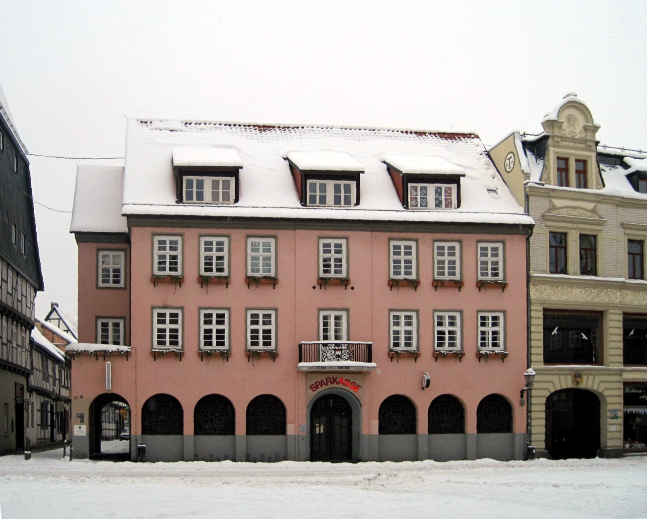 Gebäude der Harzsparkasse in Quedlinburg auf dem Marktplatz.